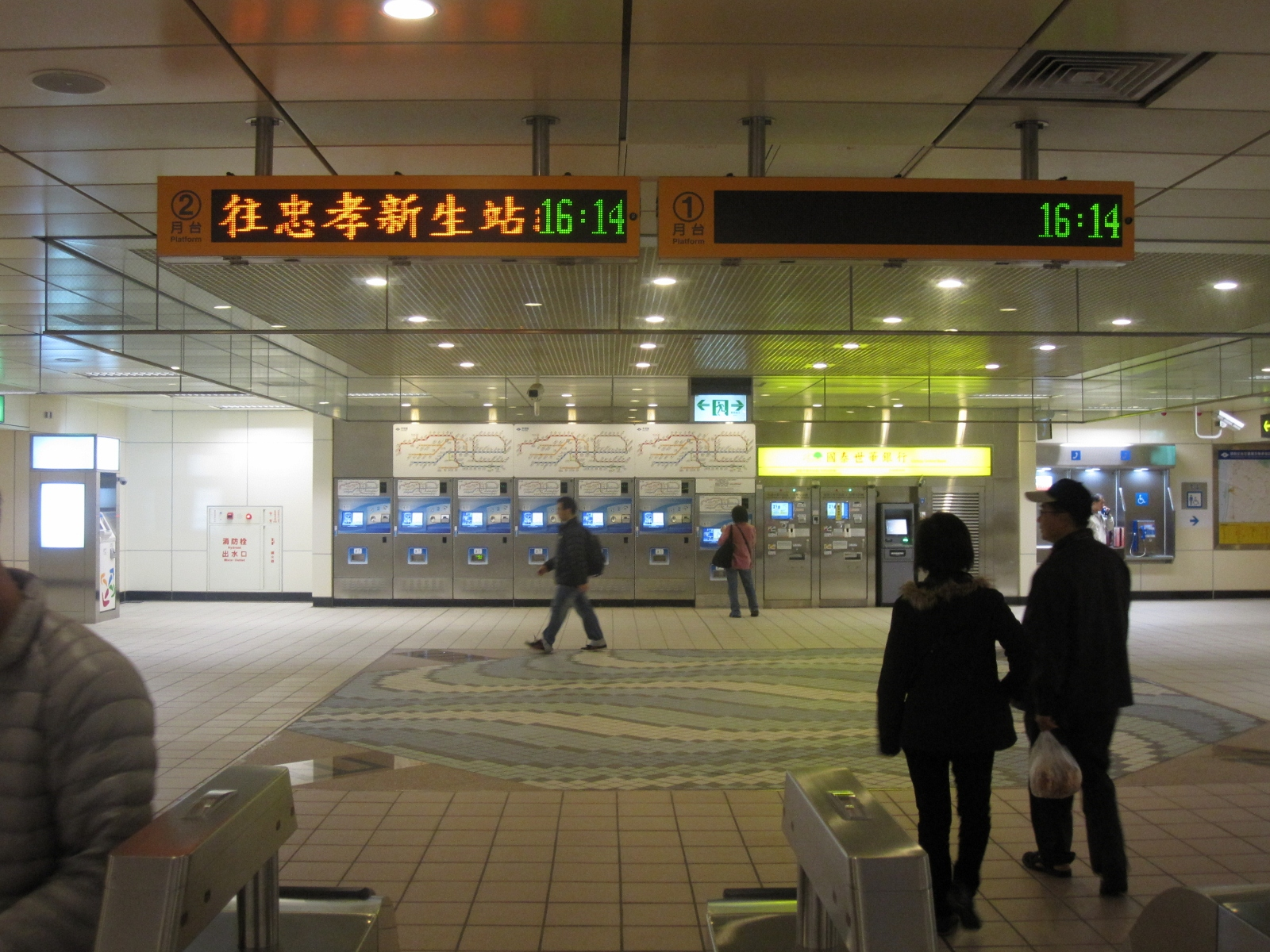 頭前庄站穿堂層資訊顯示看板